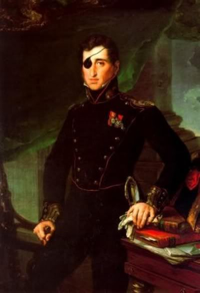 Cipriano Palafox y Portocarrero (15 de septiembre de 1784 - Madrid, 15 de marzo de 1839) fue un noble, político y militar español, Grande de España (1834). Fue la padre de Eugenia, la emperatriz de los franceses.